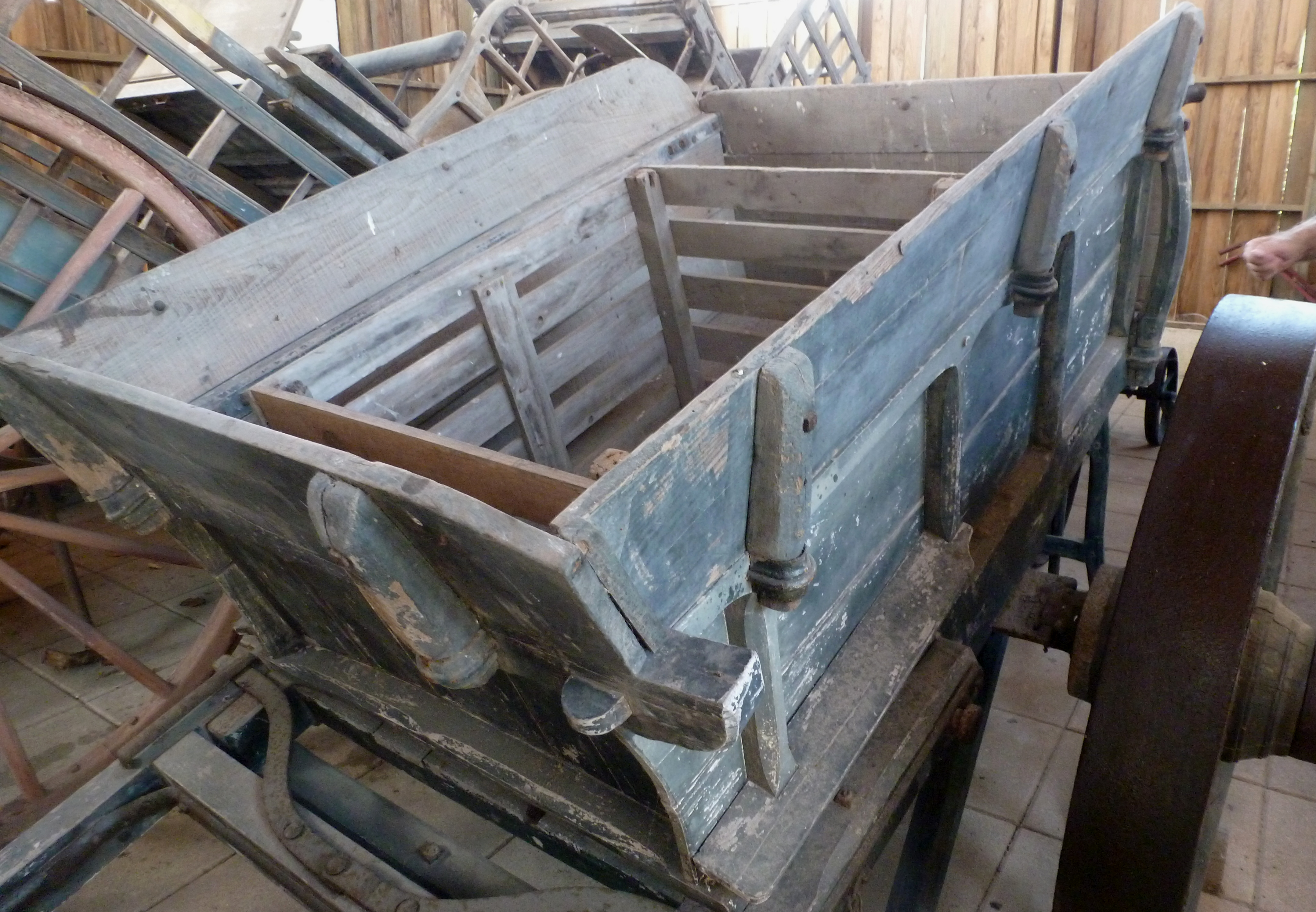 Eysines, charette tombereau pour le fumier chargé chez les éleveurs de vaches laitières et utilisé pour amender les champs.